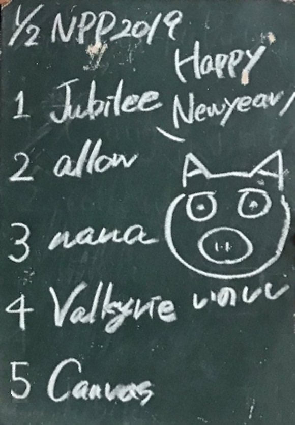 amiinAセトリボード(20190102(1))